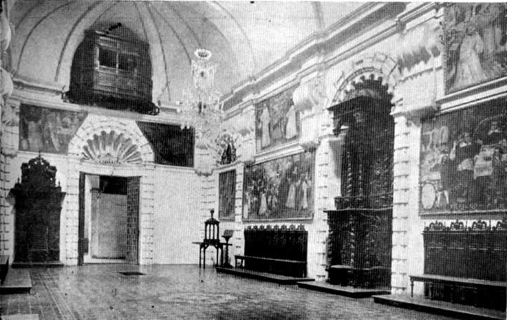 Sala Capitular del Convento de Nuestra Señora del Rosario (Iglesia de Santo Domingo), Lima, Peru. Lugar de inicio de clases de la Universidad Nacional Mayor de San Marcos, a mediados del siglo XVI.